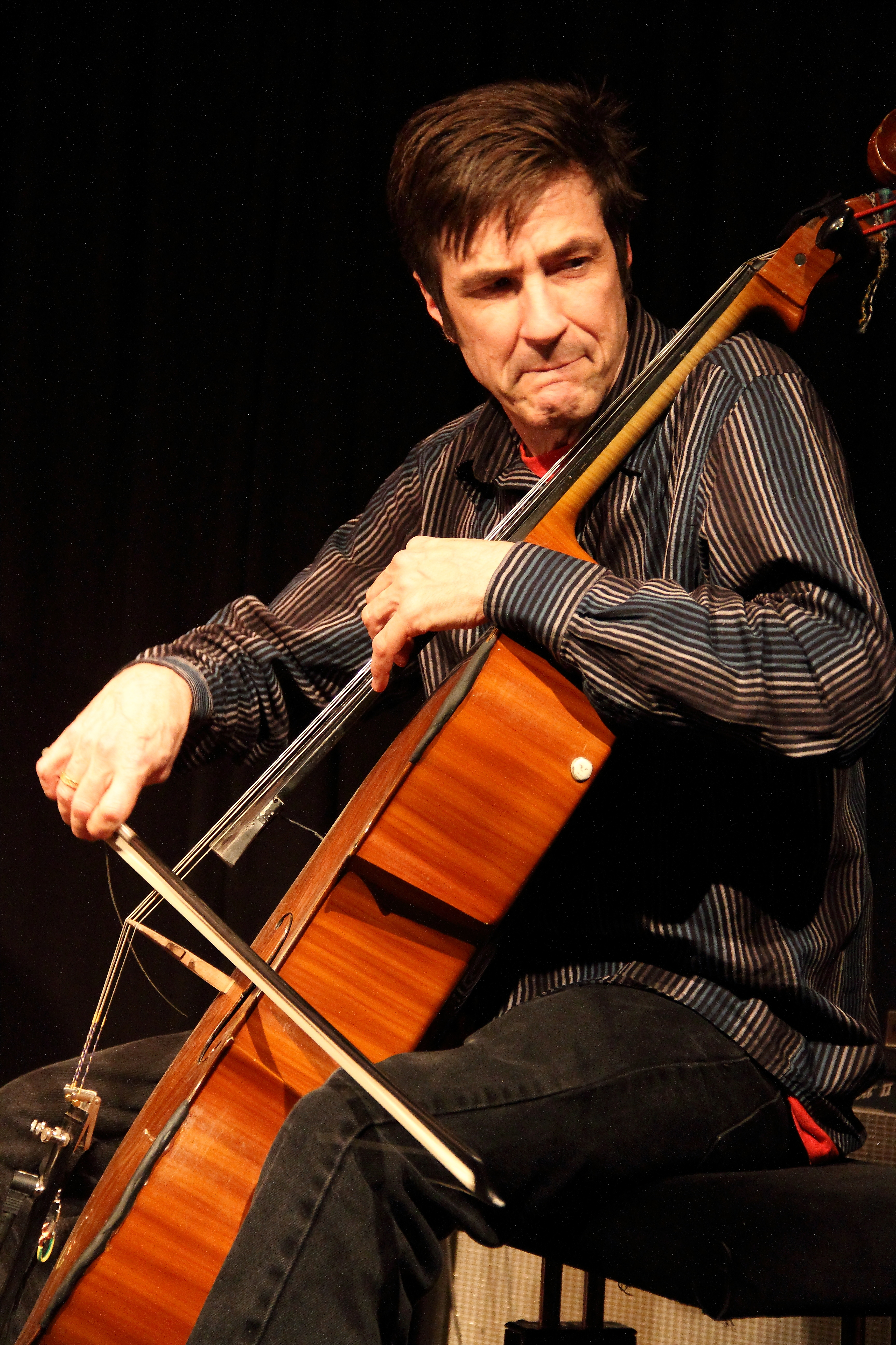 Konzert von Ullmann/Swell´s Chicago Plan im Club W71 in Weikersheim. Chicago Plan sind: Gebhard Ullmann (sax, bcl), Steve Swell (tromb), Fred Lonberg-Holm (cello, electr) und Michael Zerang (dr).